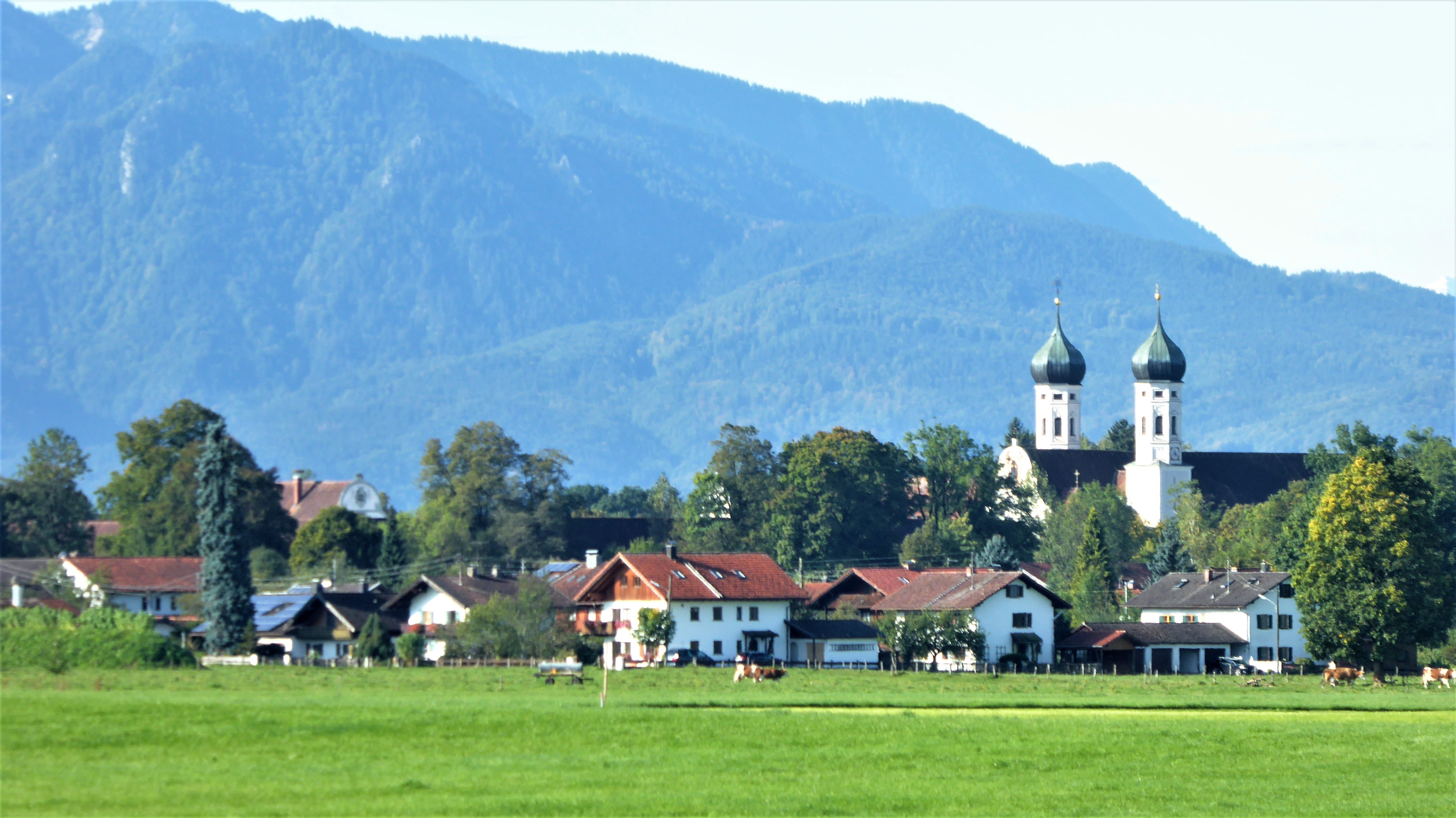 Kloster Benediktbeuern liegt am Rande von Moor und Streuwiesen der Loisach, Es ist bekannt als wirkungsstätte von Joseph von Frauenhofer, der hier die Spektrallinien im Sonnenspektum entdeckte.